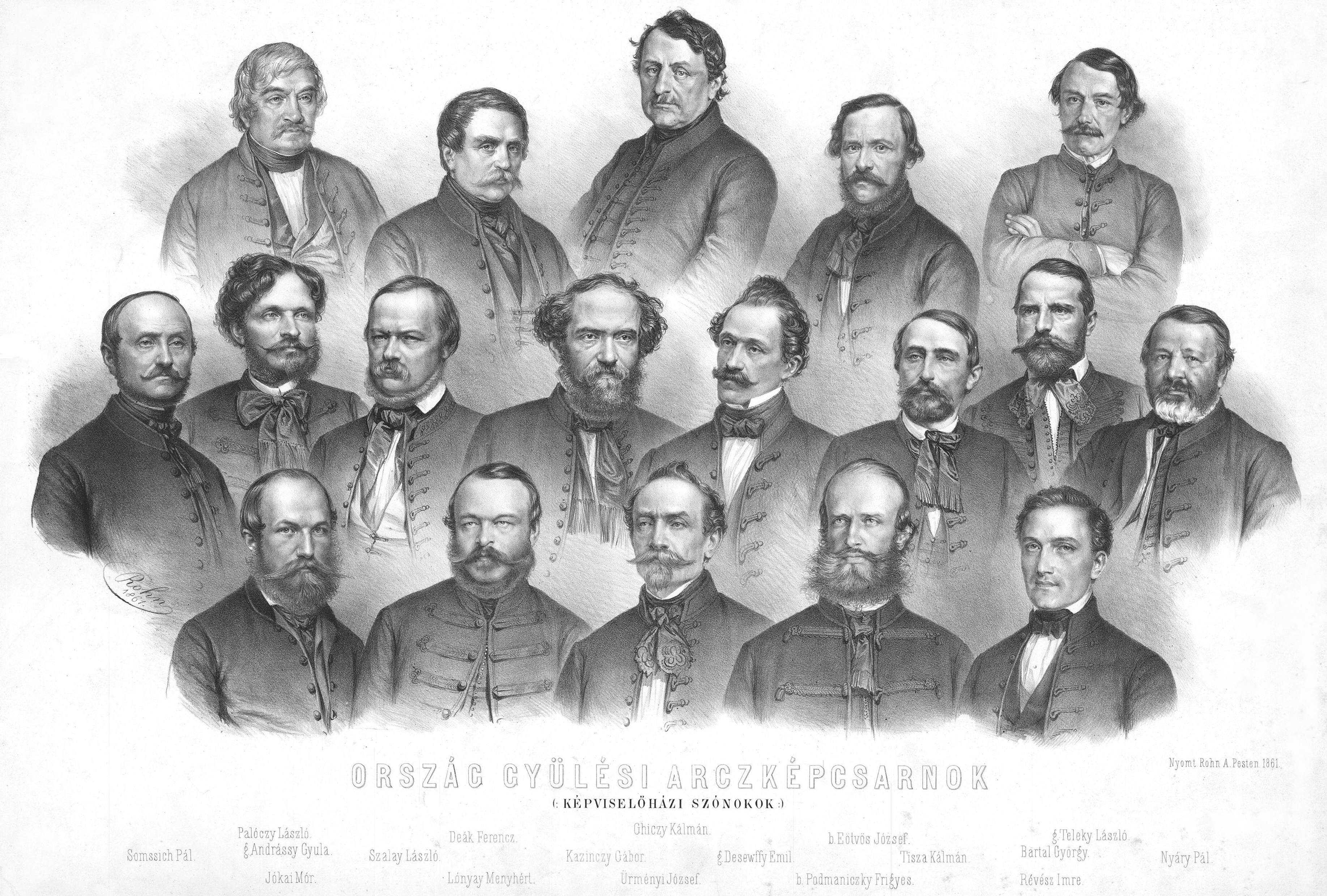 Az 1861-es országgyűlés vezető politikusai - litográfia. Felső sor: Palóczy László, Deák Ferenc, Ghyczy Kálmán, Eötvös József, Teleki László. Középső sor: Somsich Pál, Andrássy Gyula, Szalay László, Kazinczy Gábor, Dessewffy Emil, Tisza Kálmán, Bartal György, Nyáry Pál. Alsó sor: Jókai Mór, Lónyay Menyhért, Ürményi Miksa, Podmaniczky Frigyes, Révész Imre.